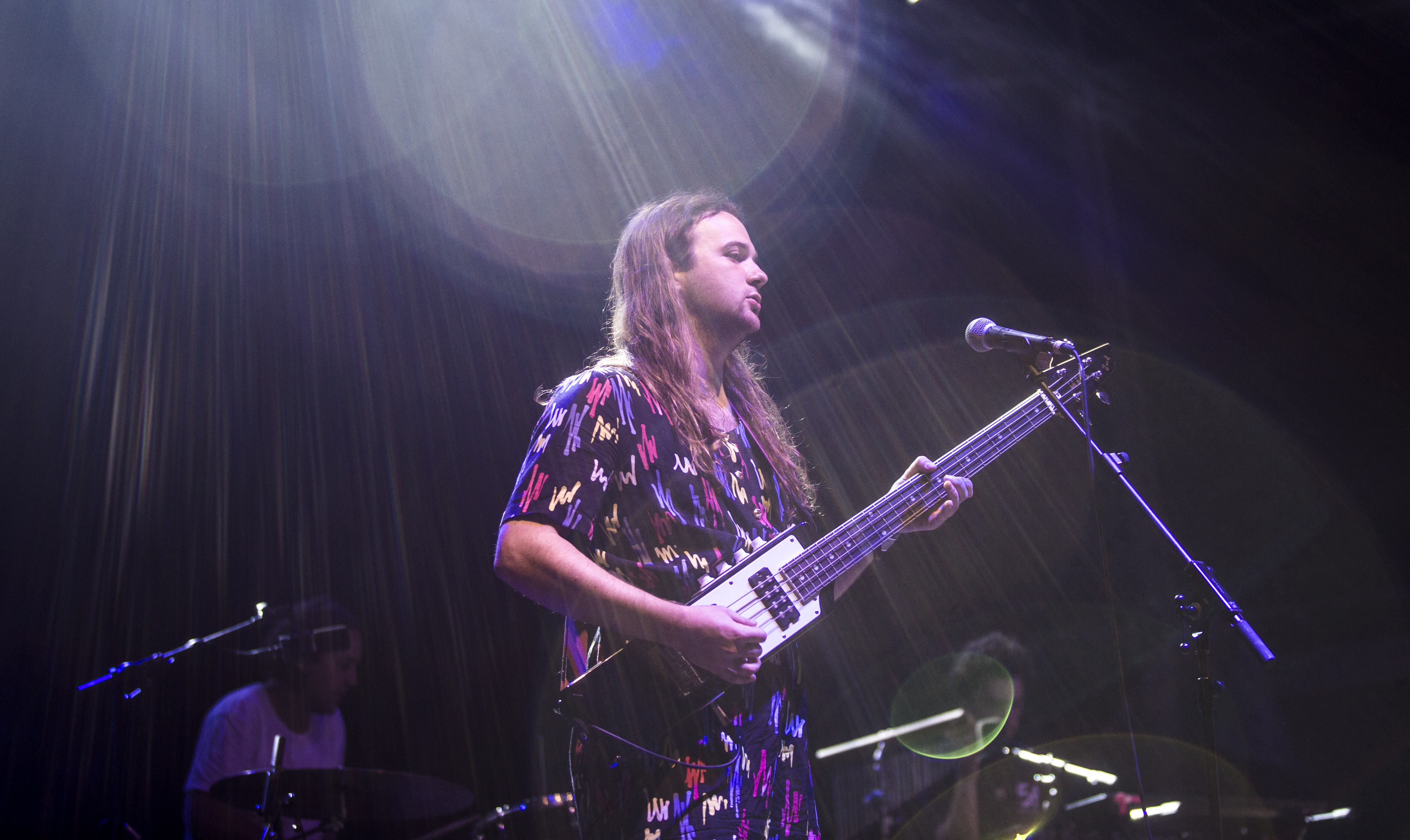 Musica